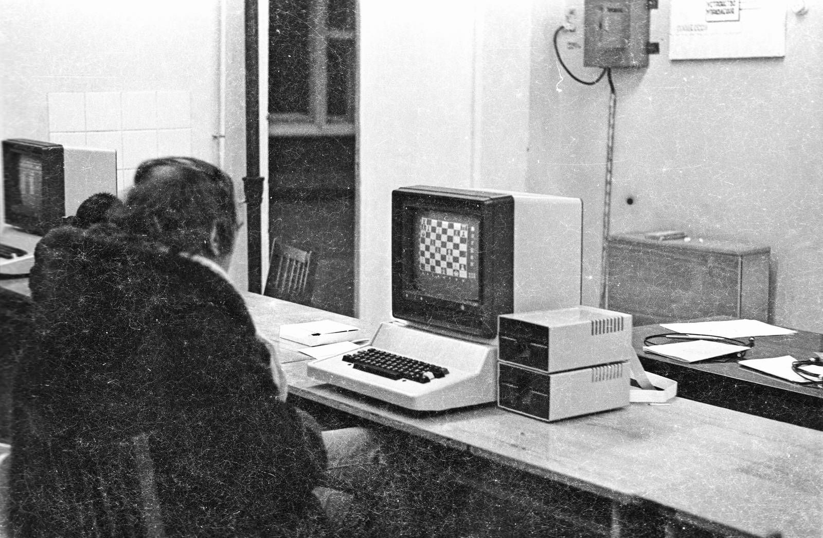 Компьютерный класс школы № 2 на Чкаловском посёлке, первая зимняя детская компьютерная школа (1985—86), компьютеры «Правец 82». С компьютерами знакомятся неизвестные школьные работники. Зимой в этом классе велись занятия для детей и для взрослых. Экзаменов не было: дети отчитывались творческими работами, а взрослые никак не отчитывались. Занятия вели молодые сотрудники Института программных систем: Пинчуки, Hестеровы, Грязновы, Вячеслав Крюков, Леонас, Люся Гайдар, Чернышенко.